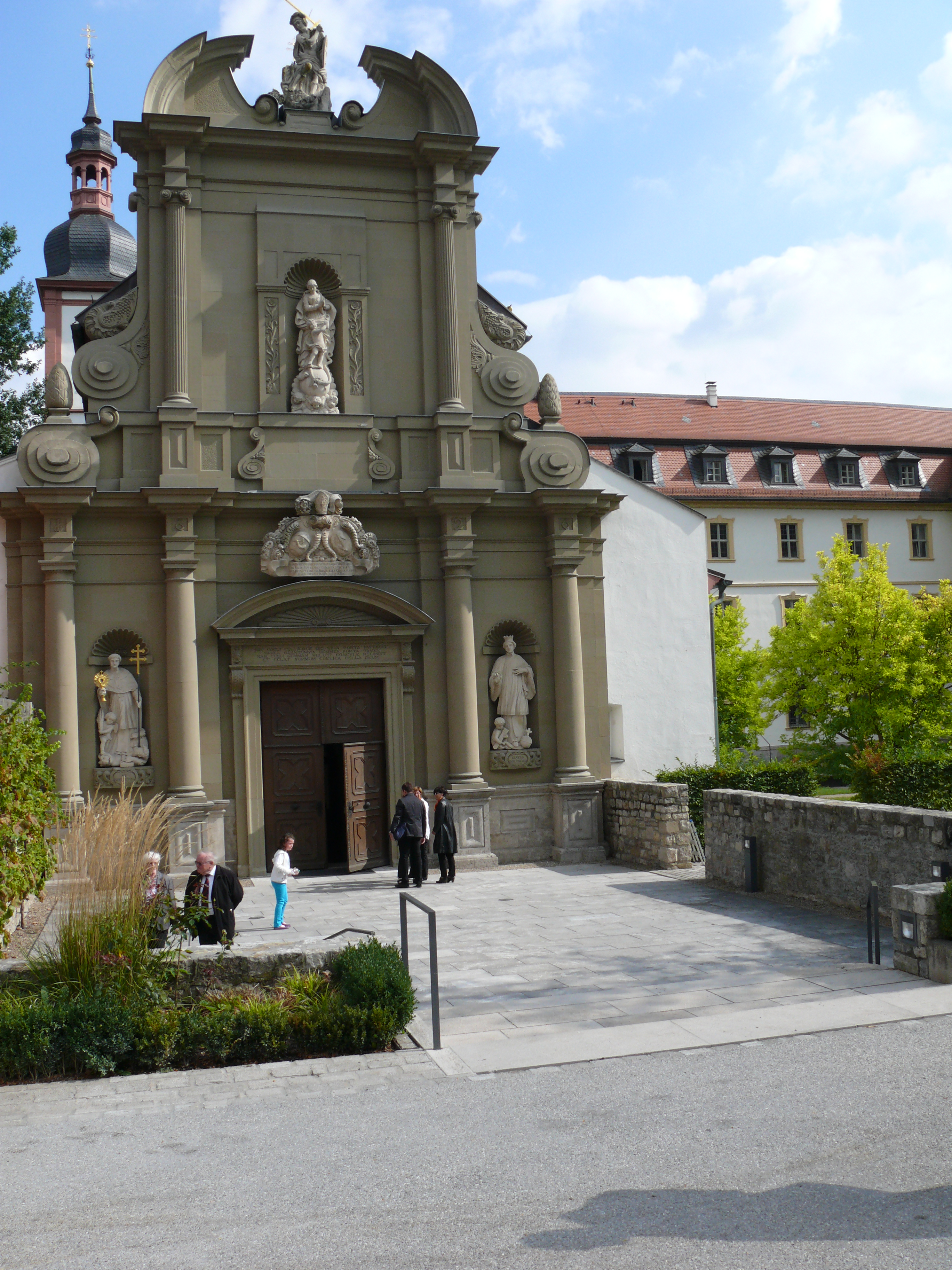 Katholische Klosterkirche St. Michael, Zell am MainThis is a photograph of an architectural monument.